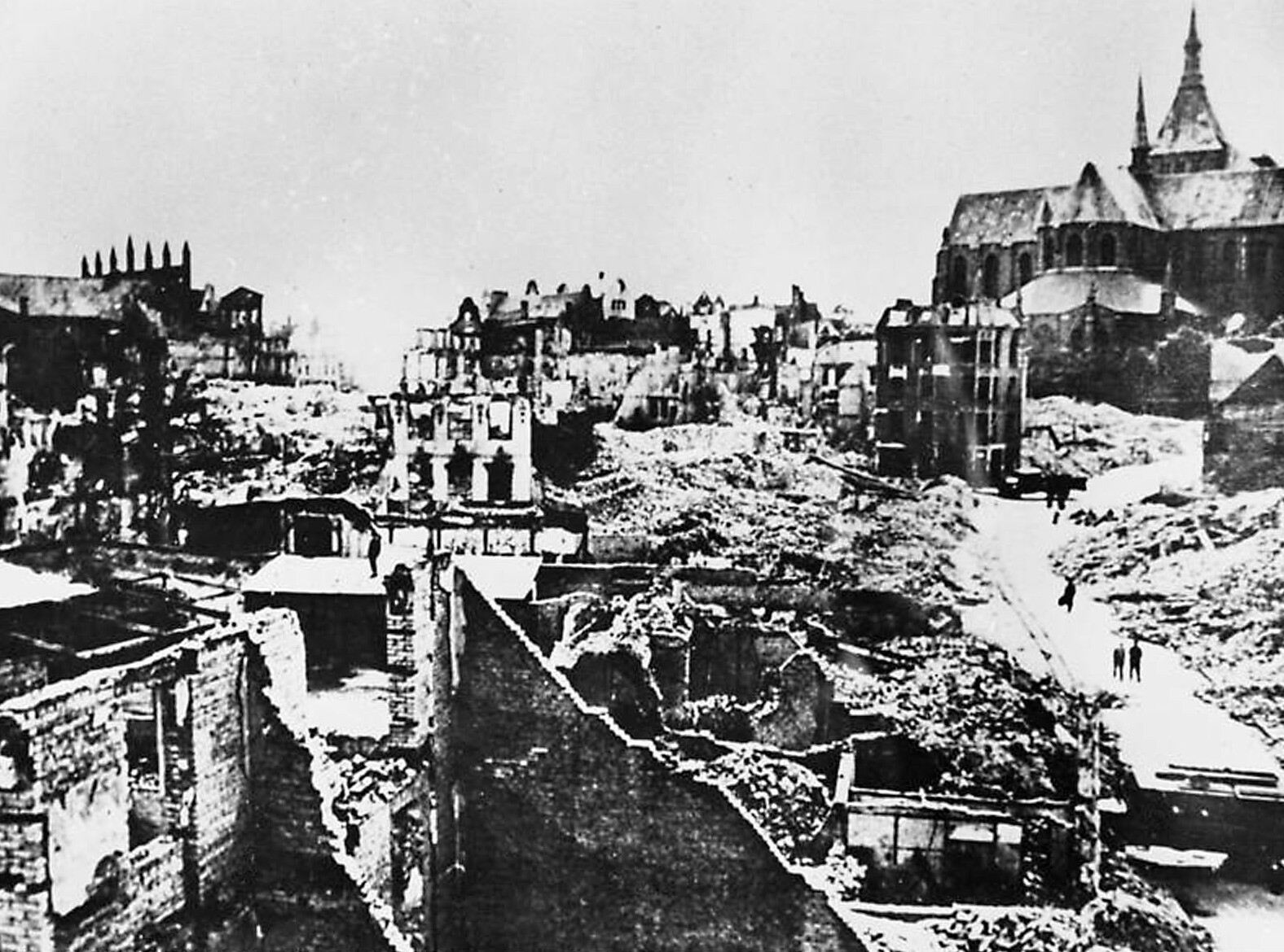 Rostock, zerstörte Krämerstrasse ADN-ZB/Levermann/6.3.85 Rostock: Chronist mit der Kamera war Hildegard Levermann vor allem für die Bezirkstadt an der Ostsee. 1946 begann sie als Mitarbeiterin der ersten Pressestelle der Stadt. Fotografiert hatte sie jedoch schon zuvor. So entstand diese Aufnahme der Krämerstrasse im Jahre 1942.